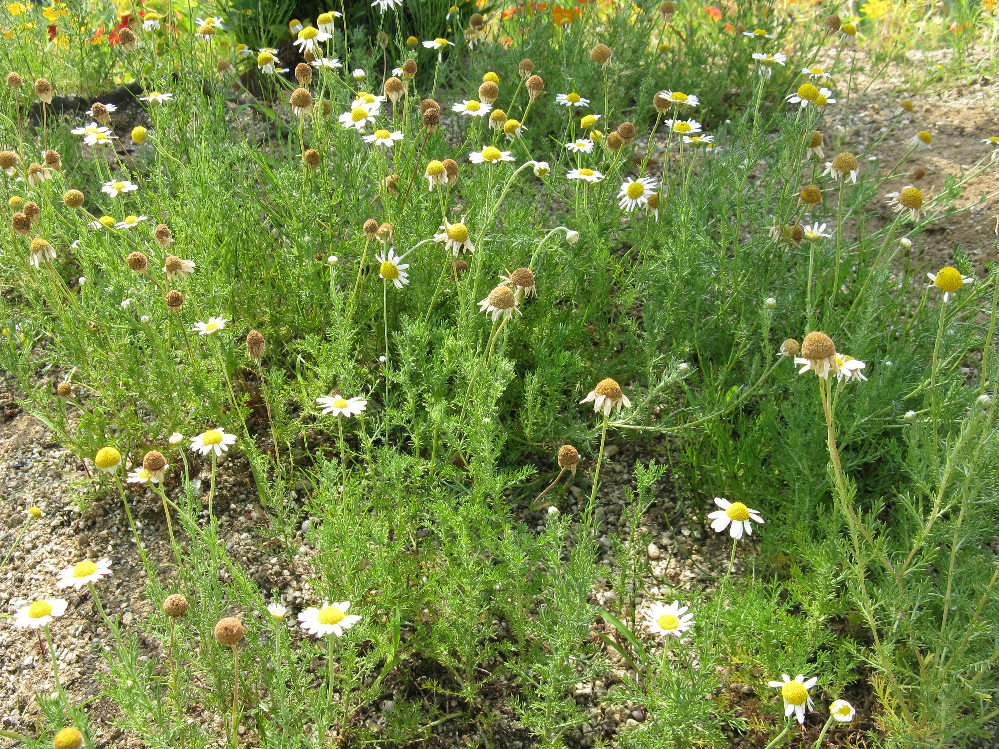 Scientific name Chamaemelum nobile